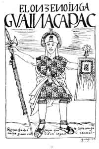 Illustration from the book El primer nueva corónica y buen gobierno